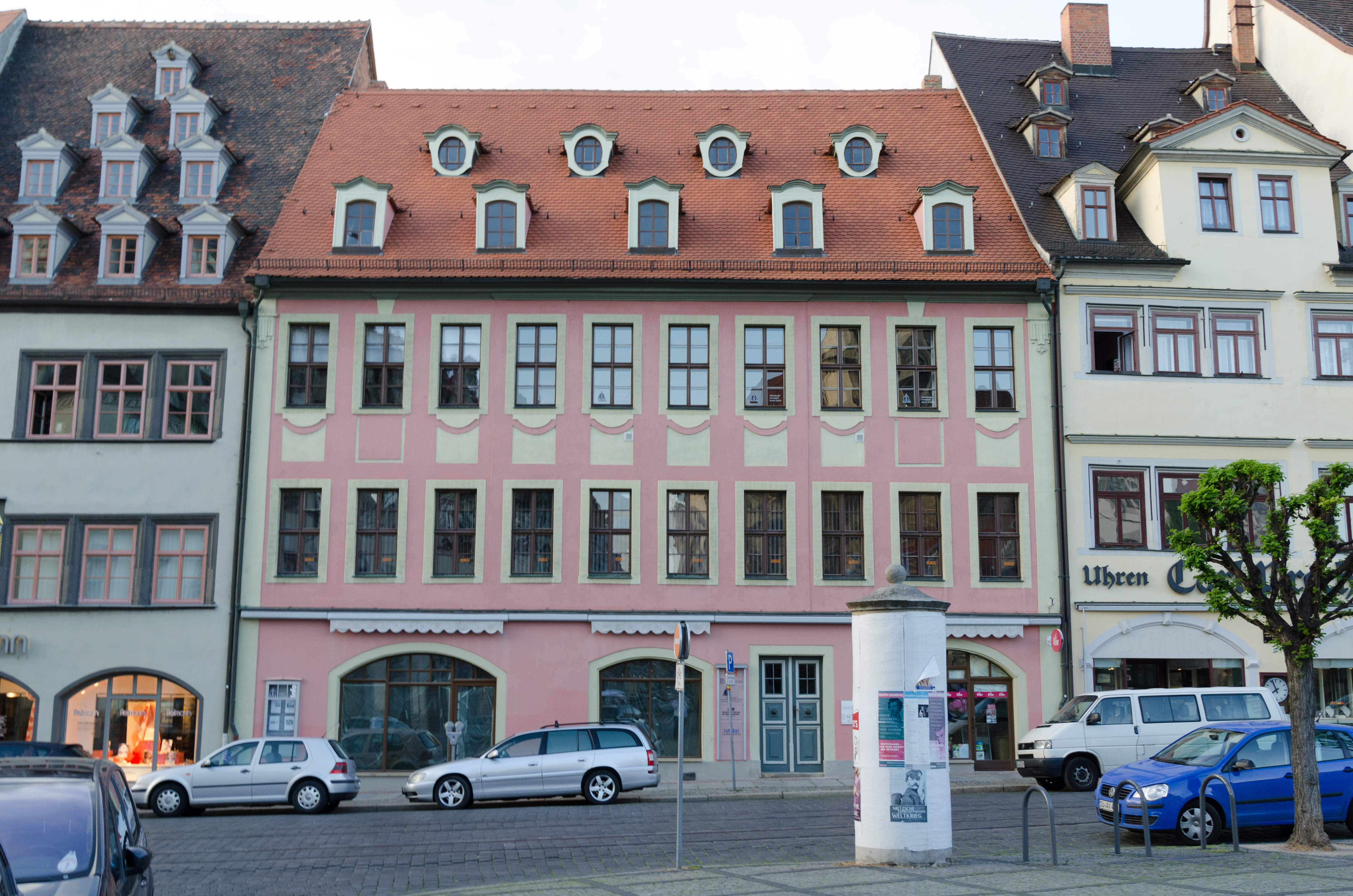 Naumburg, Markt 14